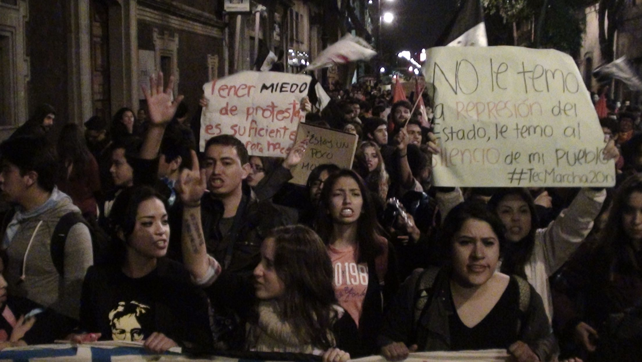 Contingente de estudiantes del Tec de Monterrey en la marcha “Júrame que no te rindes” por los 43 normalistas desaparecidos en Iguala, Guerrero. En carteles expresan sus demandas. El contingente marcha sobre la calle de Tacuba. Forma parte en la caravana “Julio César Mondragón Fontes”, desde Tlatelolco, hasta el Centro Histórico de la Ciudad de México, México.